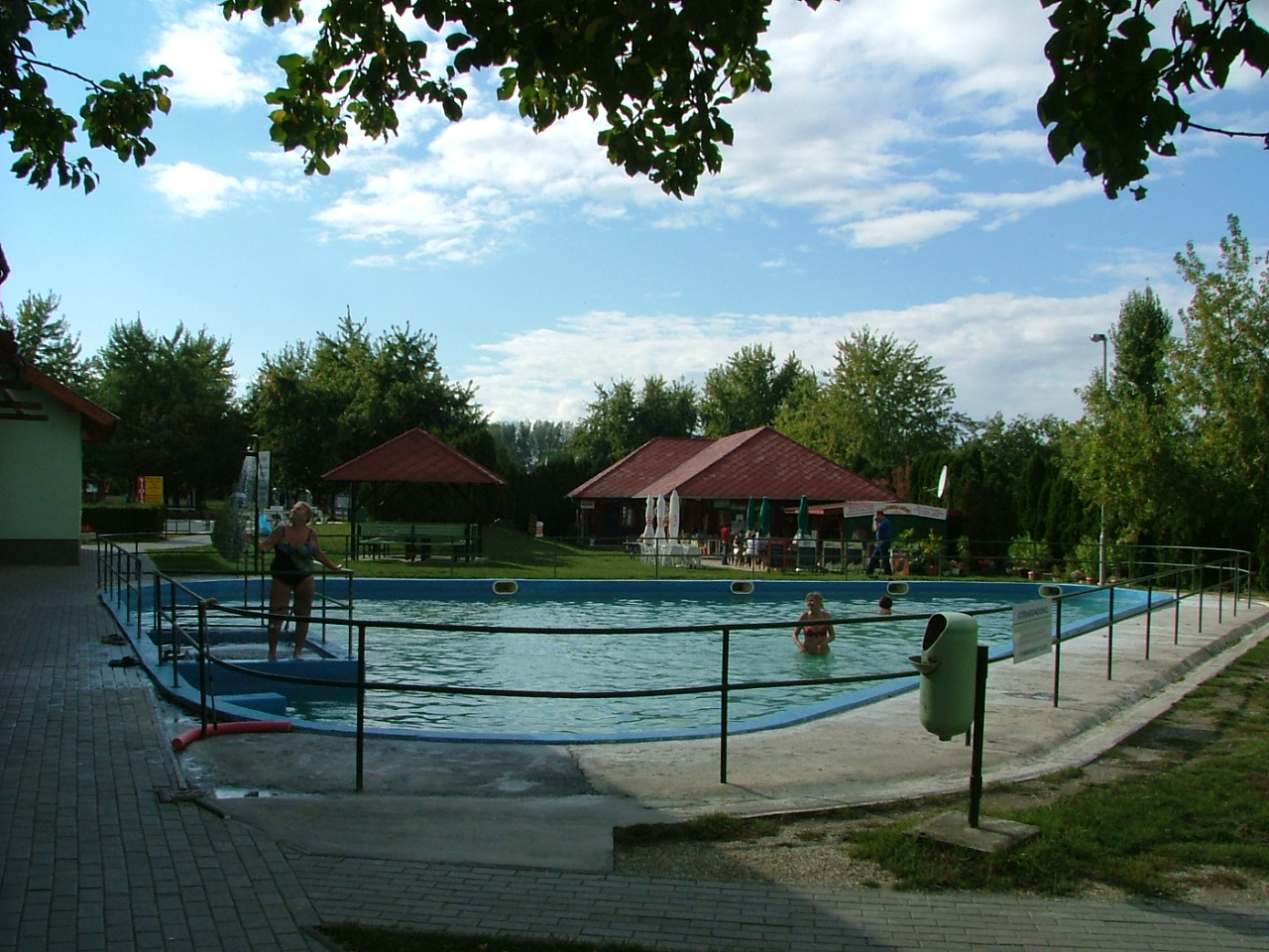 Termálfürdő Hegykőn